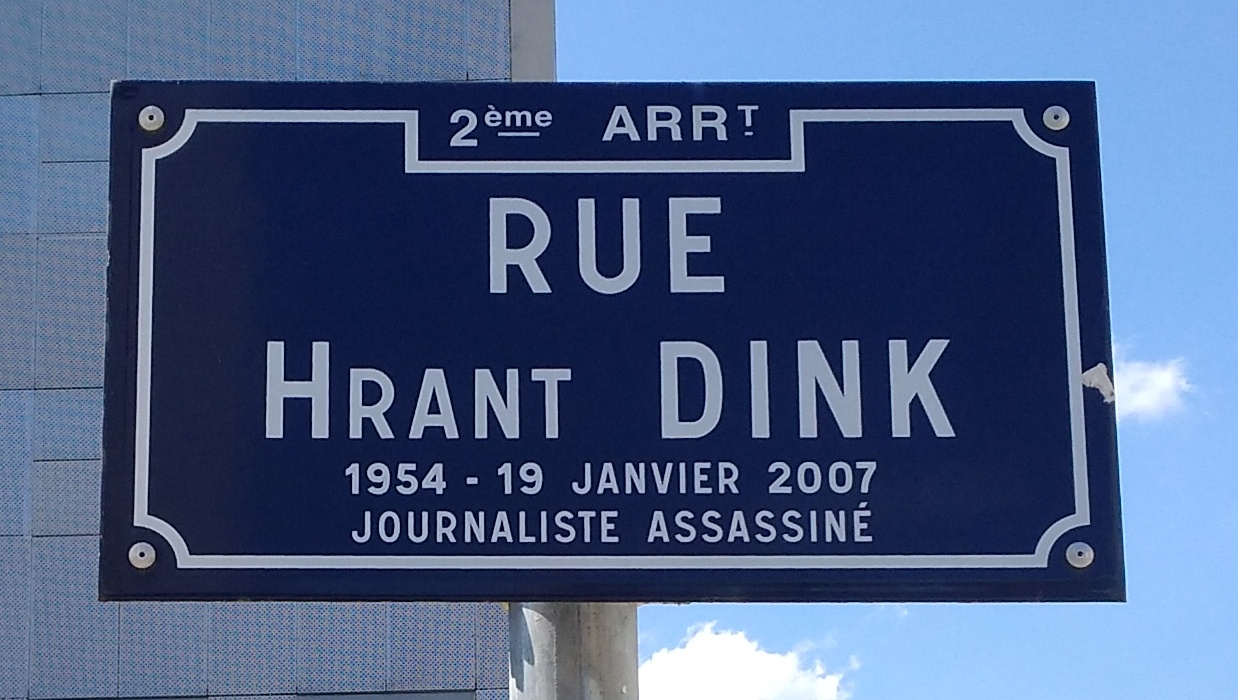 Plaque de la rue Hrant-Dink, dans le 2e arrondissement de Lyon.